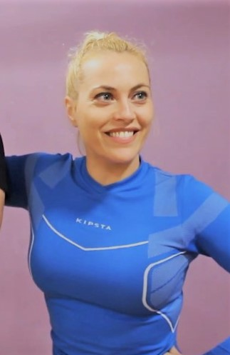 La presentadora y locutora española Daniela Blume en diciembre de 2017.